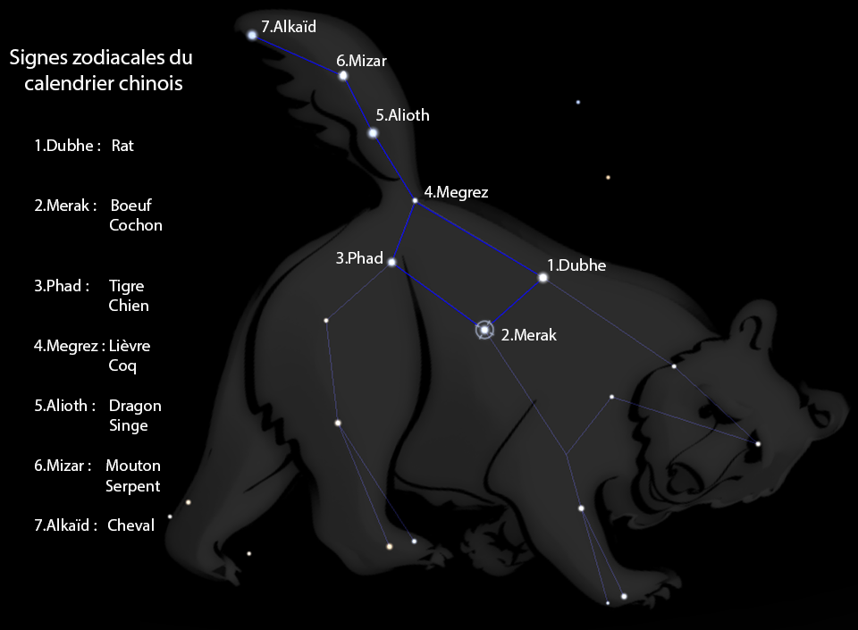 Attribution des étoiles de la Casserole en fonction de l'année de naissance dans le calendrier zodiacal chinois